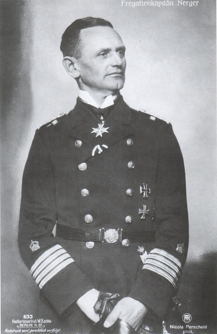 Korvettenkapitän Karl August Nerger, Kommandant von SMS Wolf